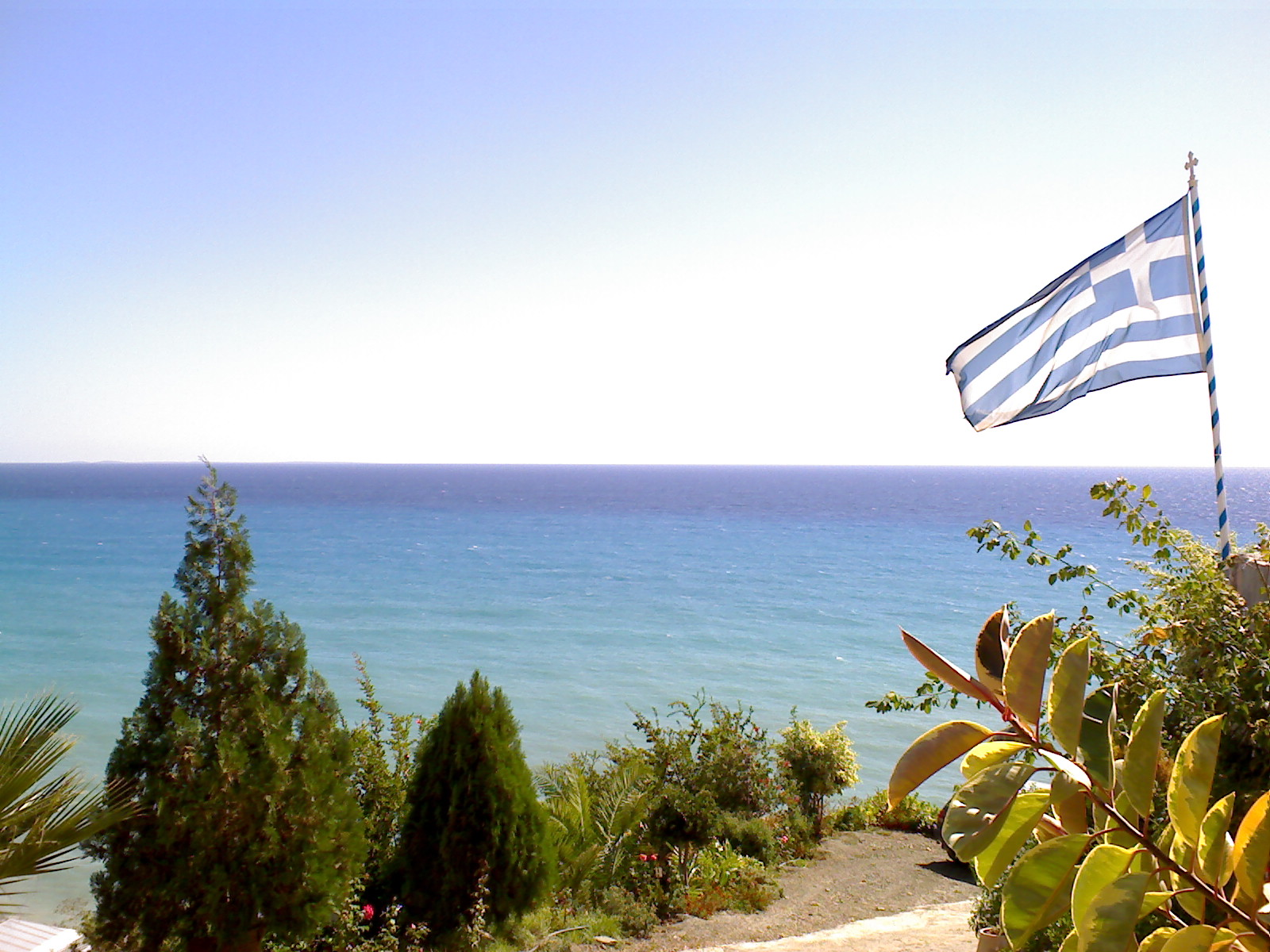 H_shmaia_mas